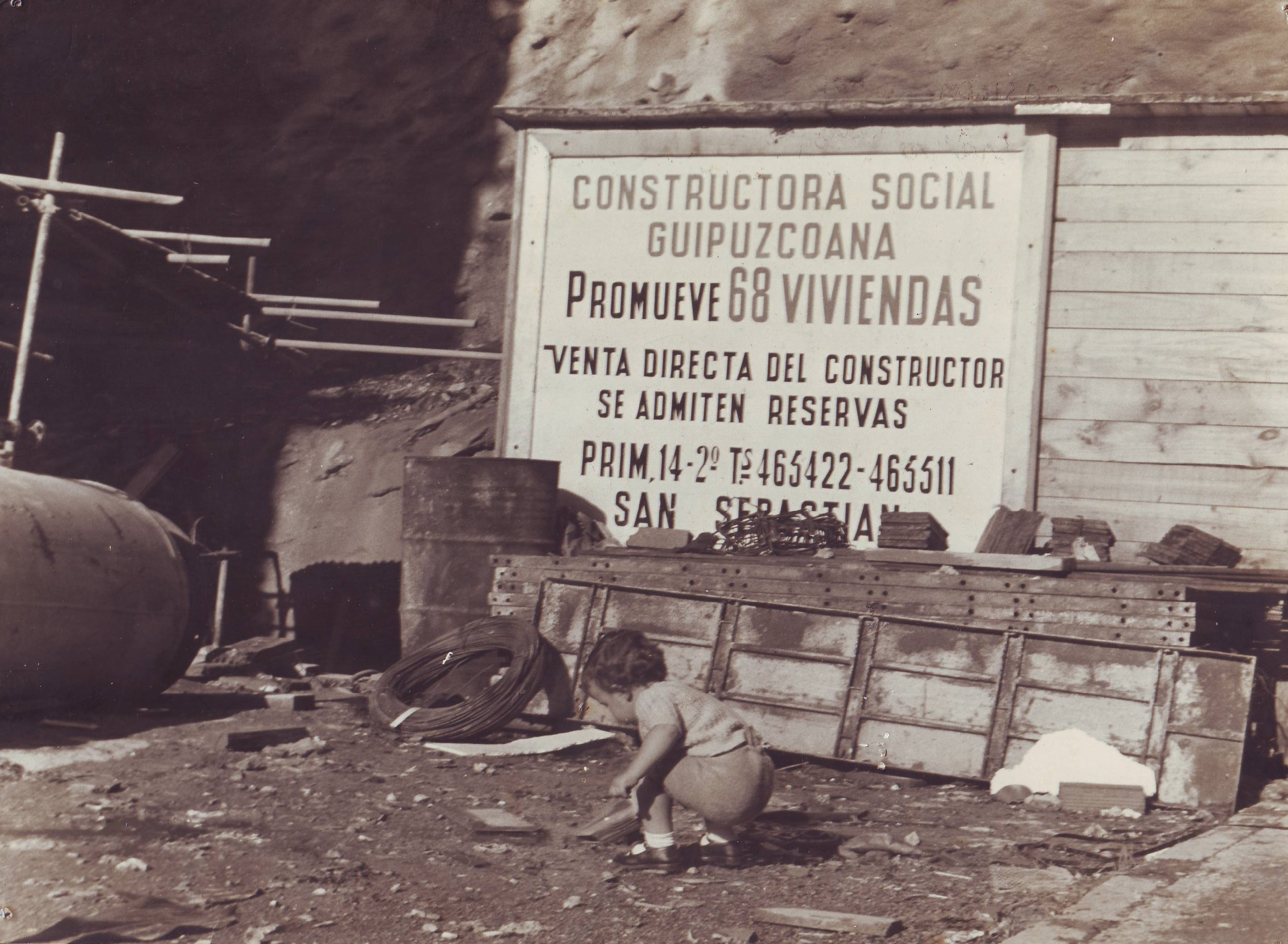 Larratxoko kalea 1970. hamarkadan.